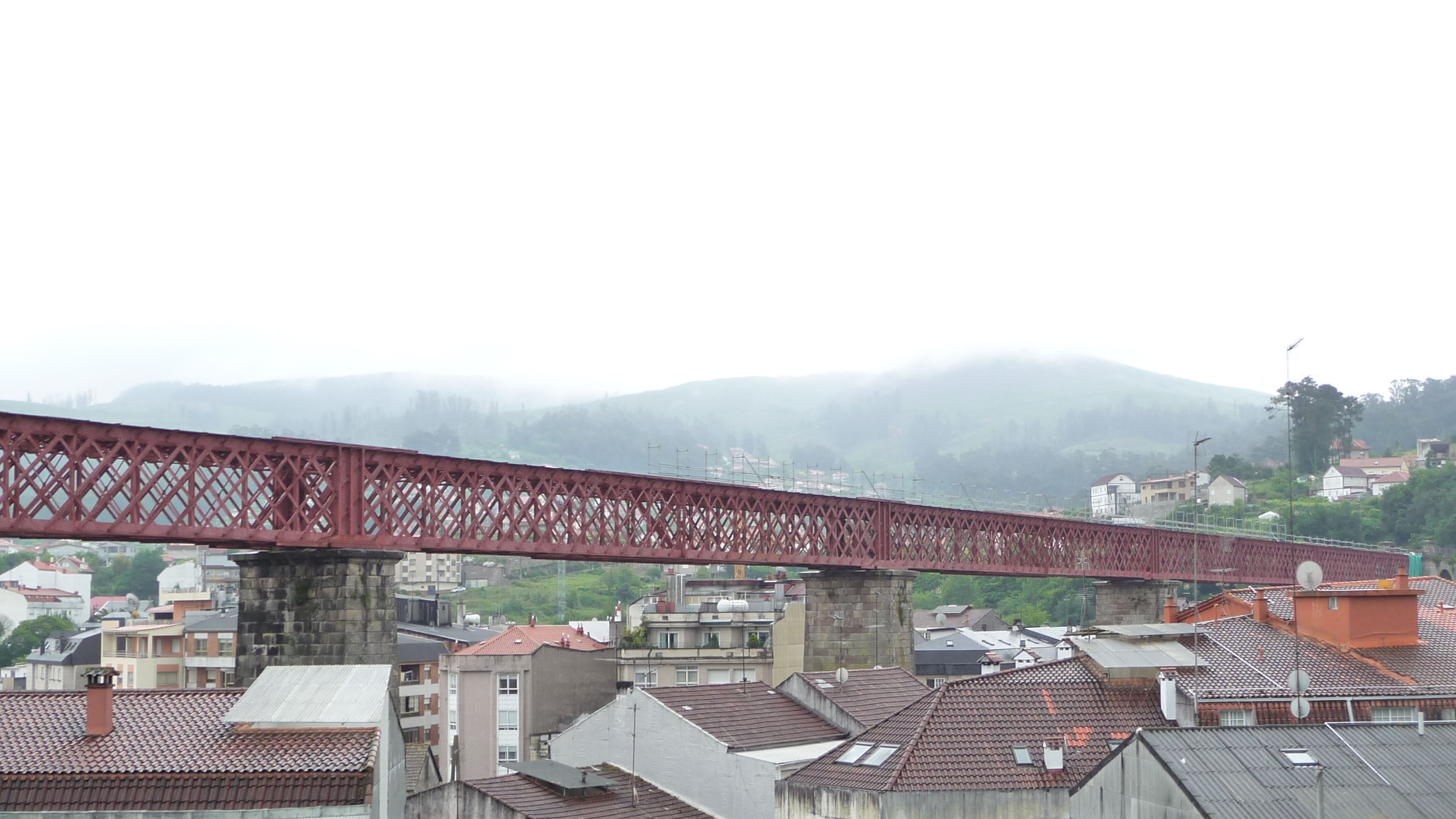 Redondela Viadukt